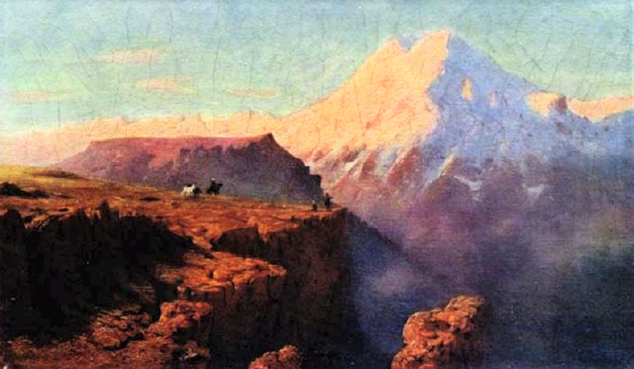 El'brus al sorgere del sole